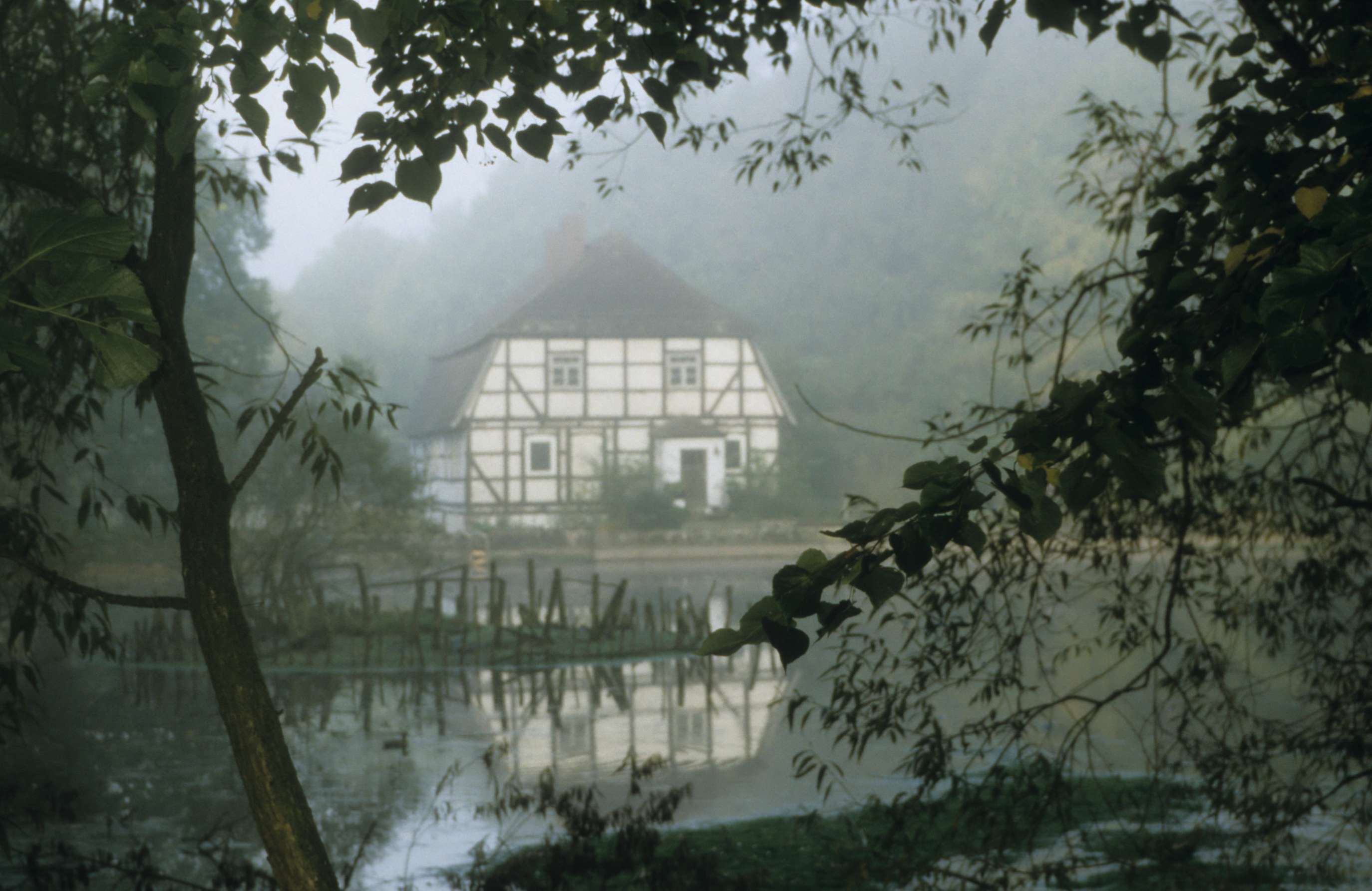 Teich bei der Mühle und Mühlengebäude in Schorborn, Gemeinde Deensen, bei Nebel